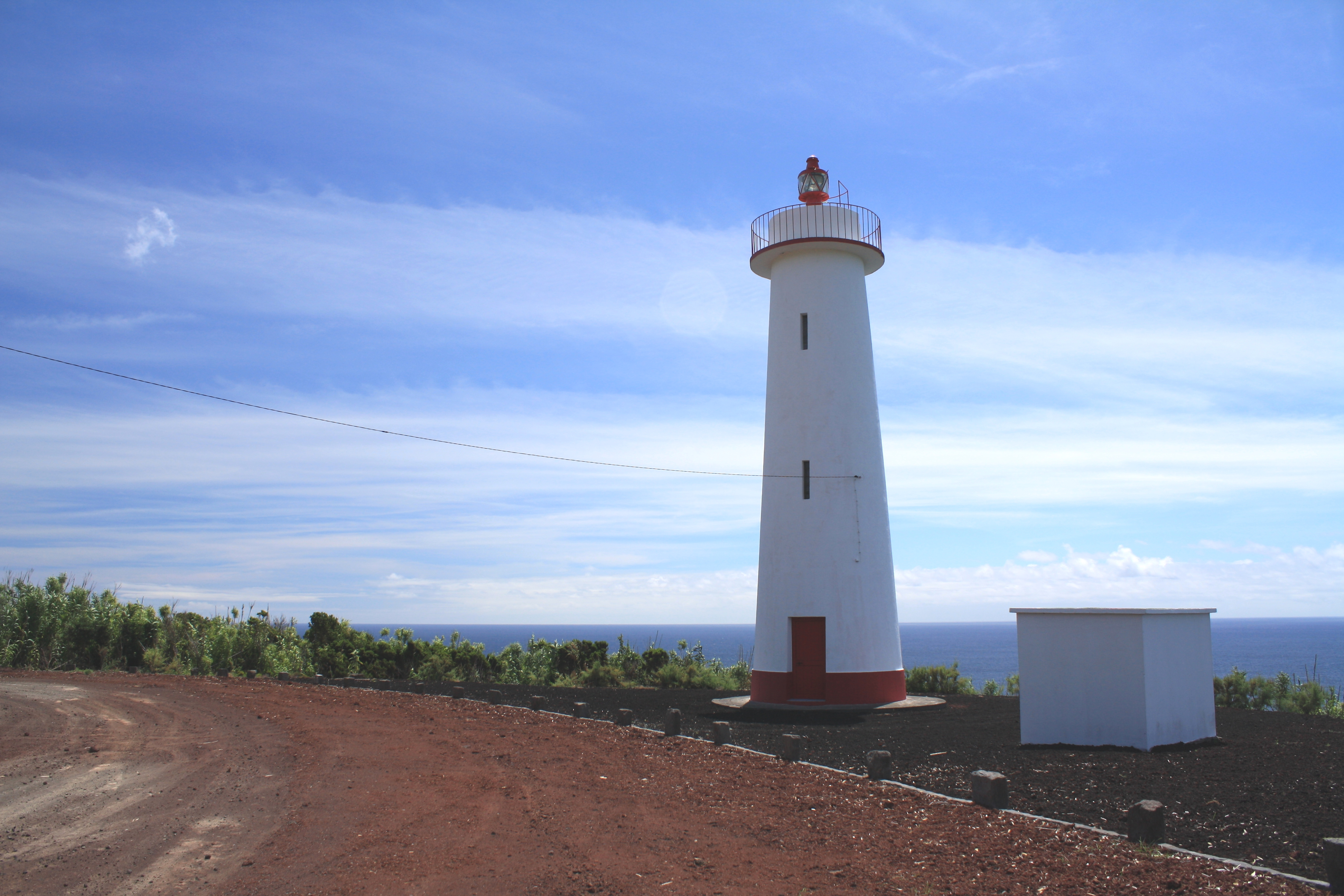 Leuchtturm Farol de Vale Formoso auf der Azoreninsel Faial.